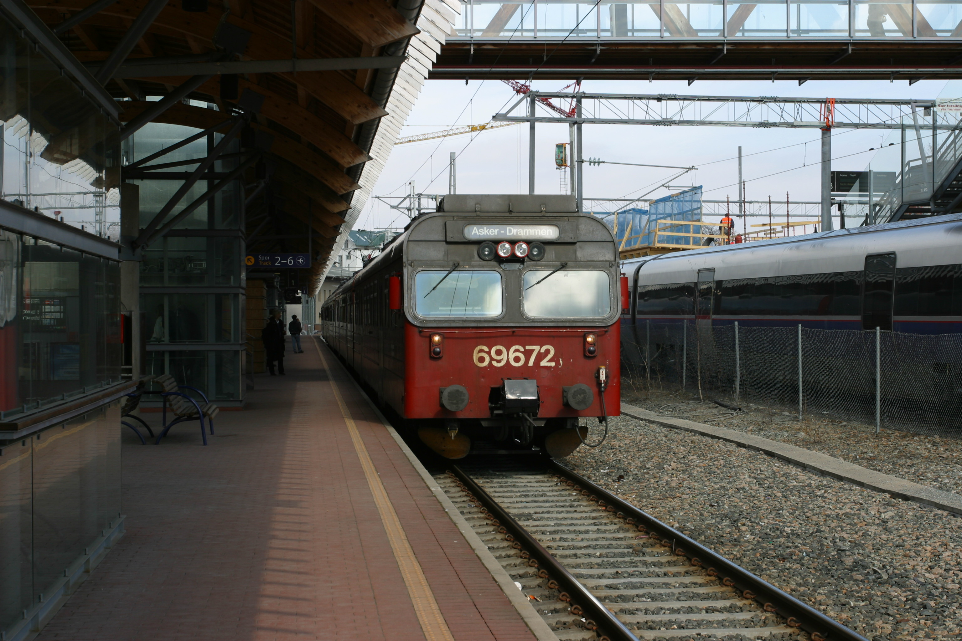 Lokaltog til Drammen klar tl avgang fra Asker stasjon